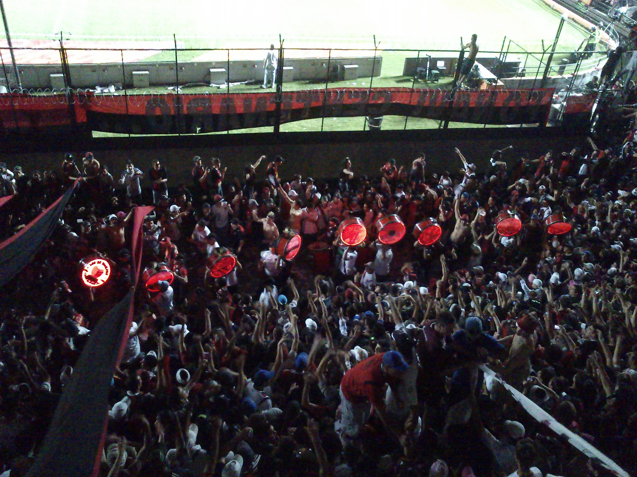 entrada de Los De Siempre